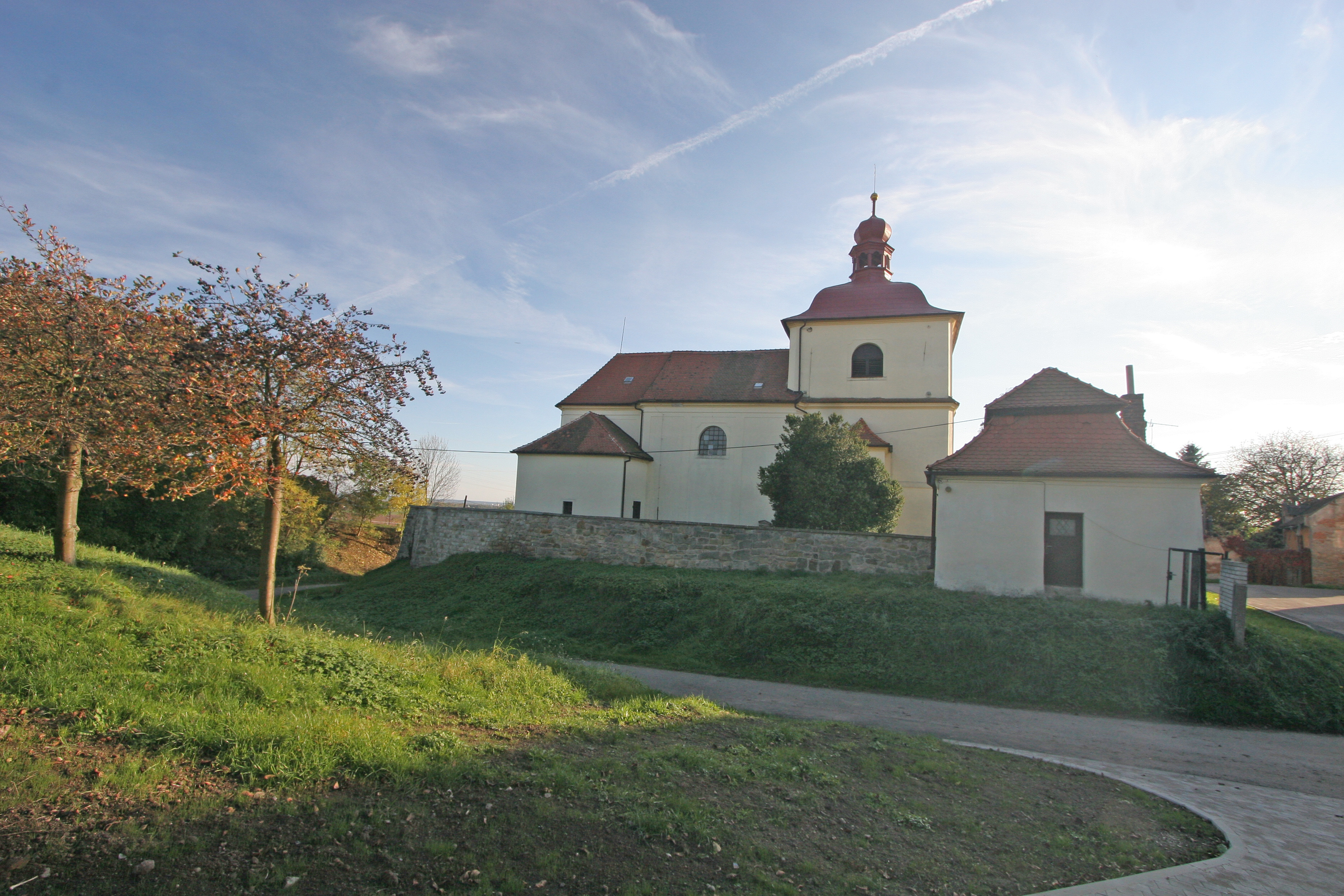 Kostel sv. Stanislava (Sendražice), Sendražice